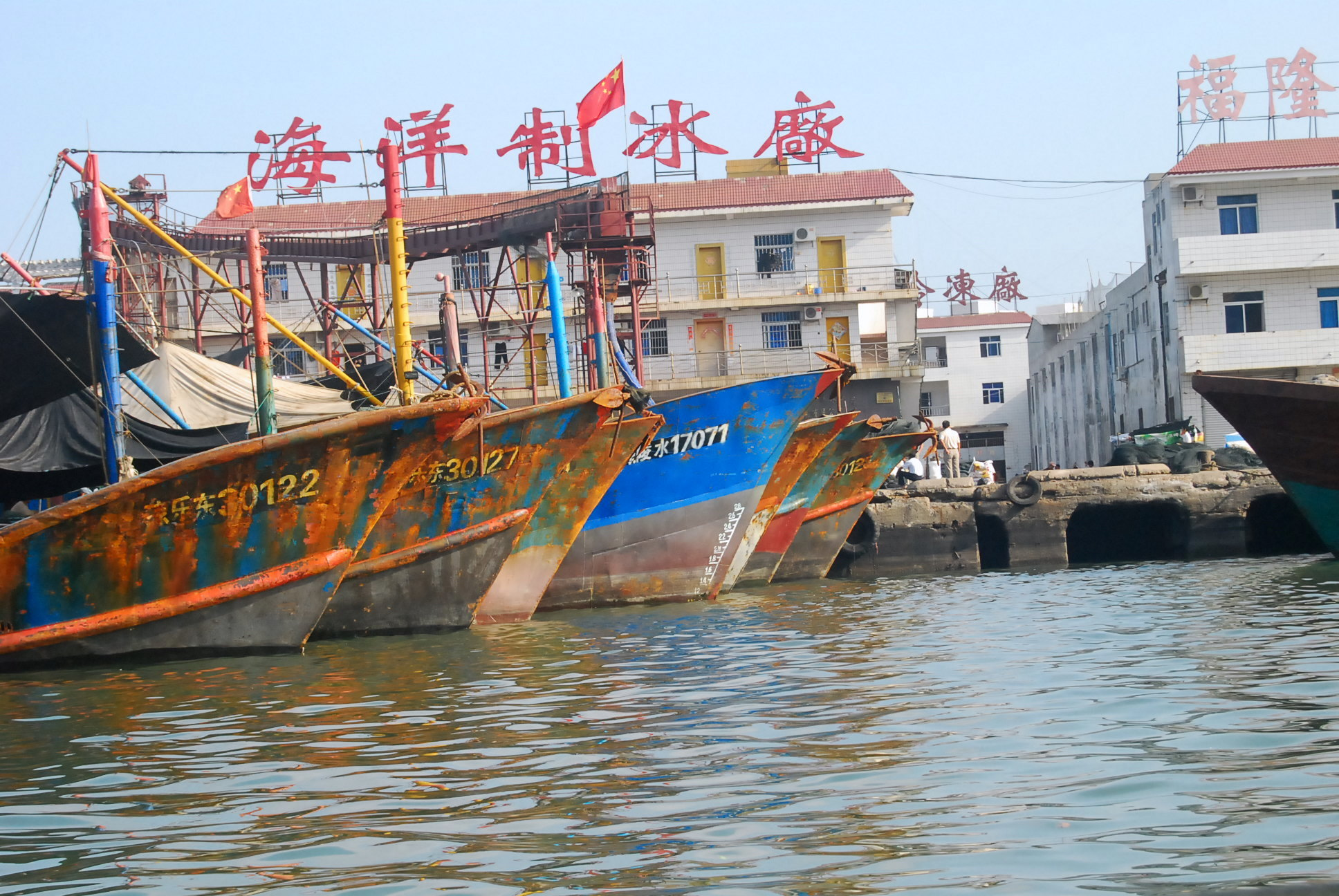 三亚蛋家的渔船